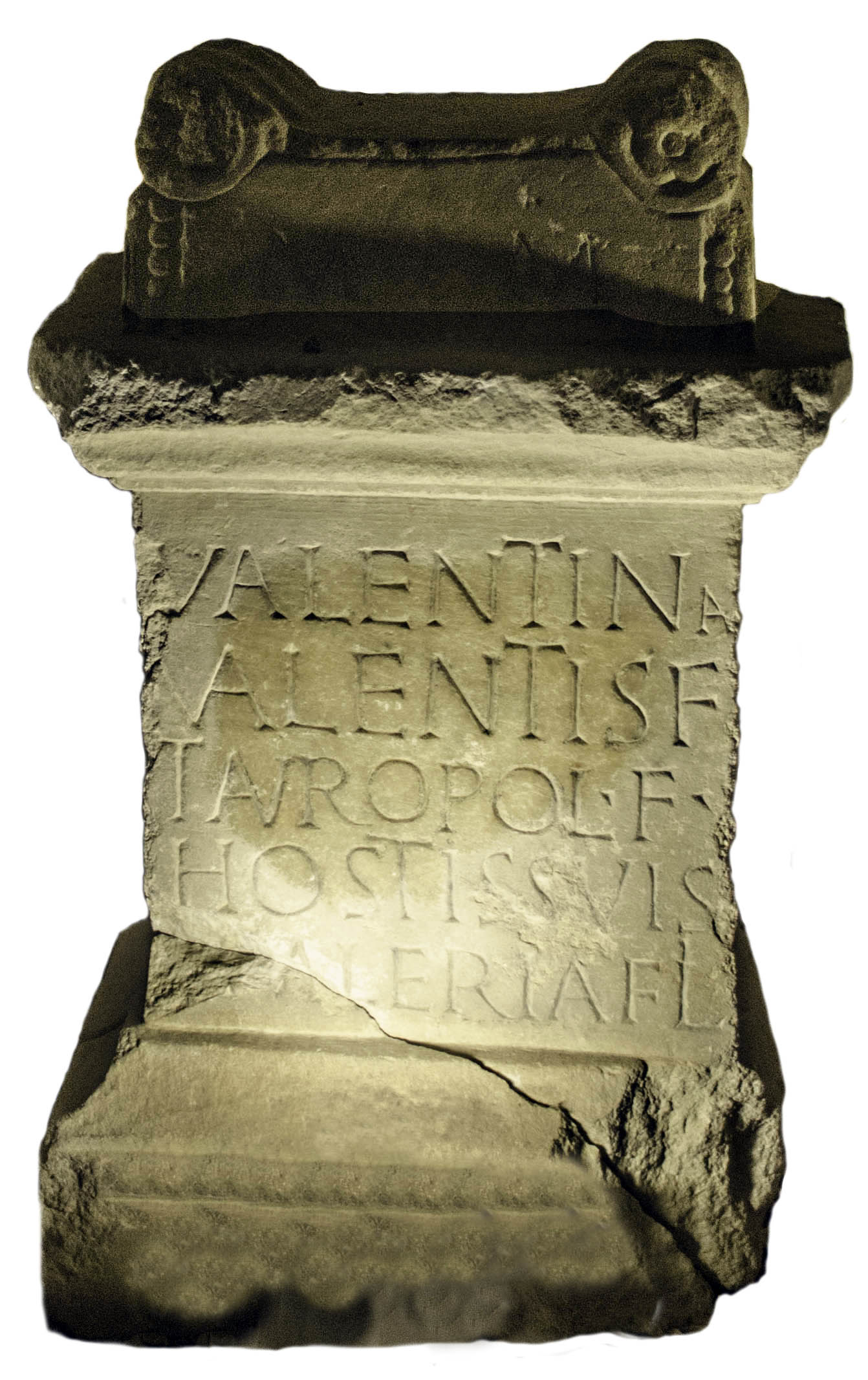 Autel taurobolique de Valentina, v. 176-200, marbre, CIL XIII, 524. Musée Eugène-Camoreyt, Lectoure.